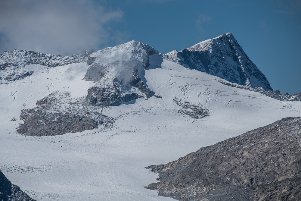 Blick von Nordosten (Rifugio Lobbia Alta) auf Corno Bianco (vorne) und Monte Adamello (hinten). Von der ursprünglichen Eiswand des Corno Bianco ist nicht mal ein Rest übrig.